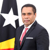 Luís Maria Lobato